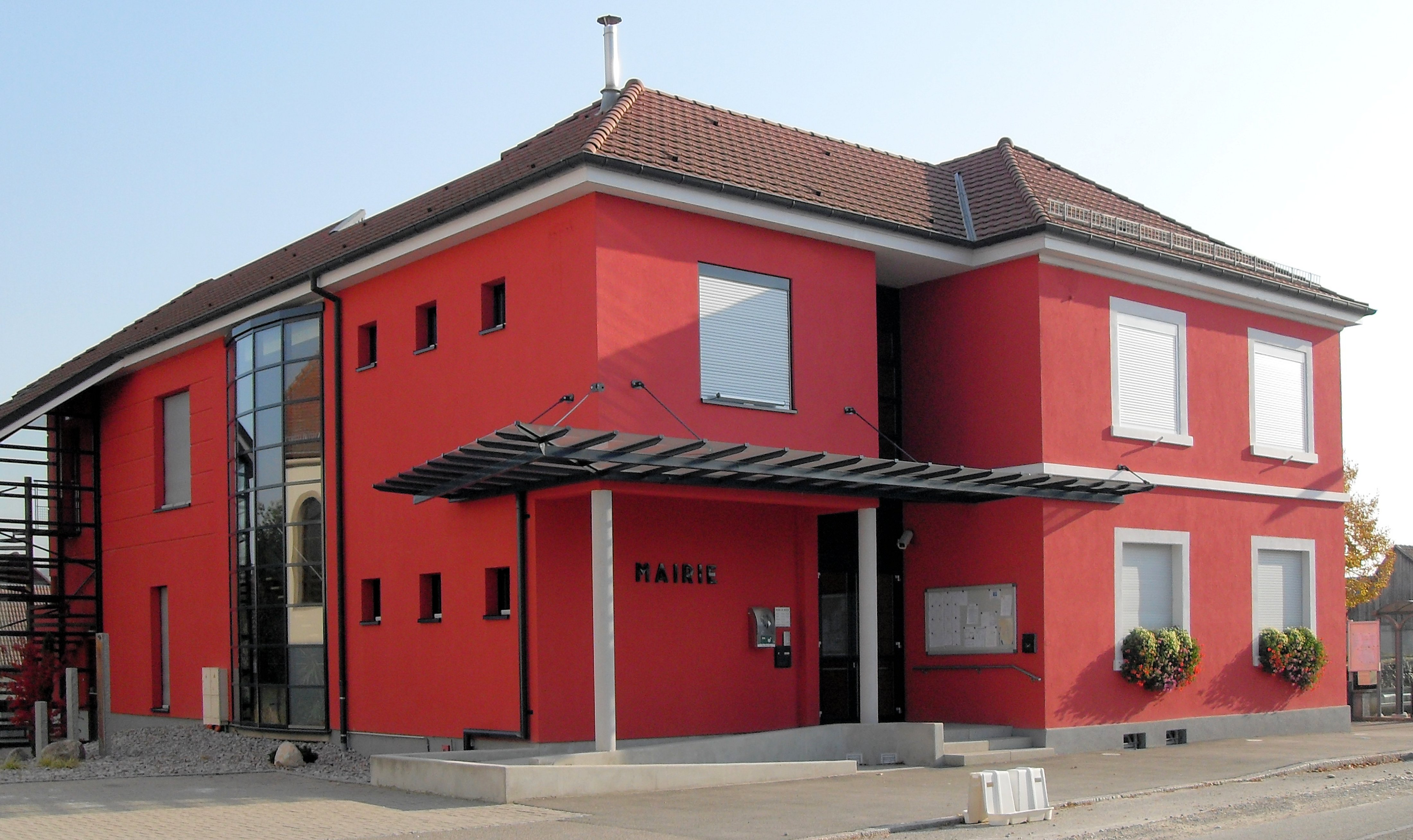 La mairie de Niffer